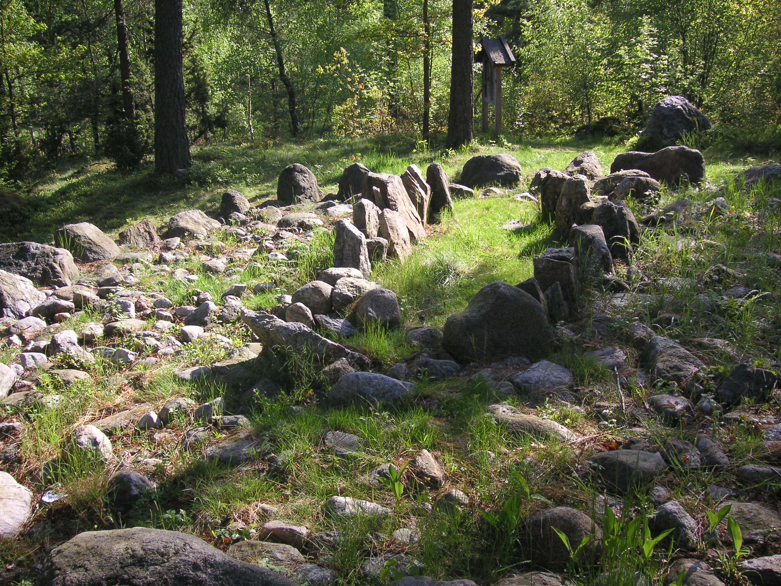 Rekonstruktion av Albykistan från stenåldern, vid Alby, Botkyrka kommun.